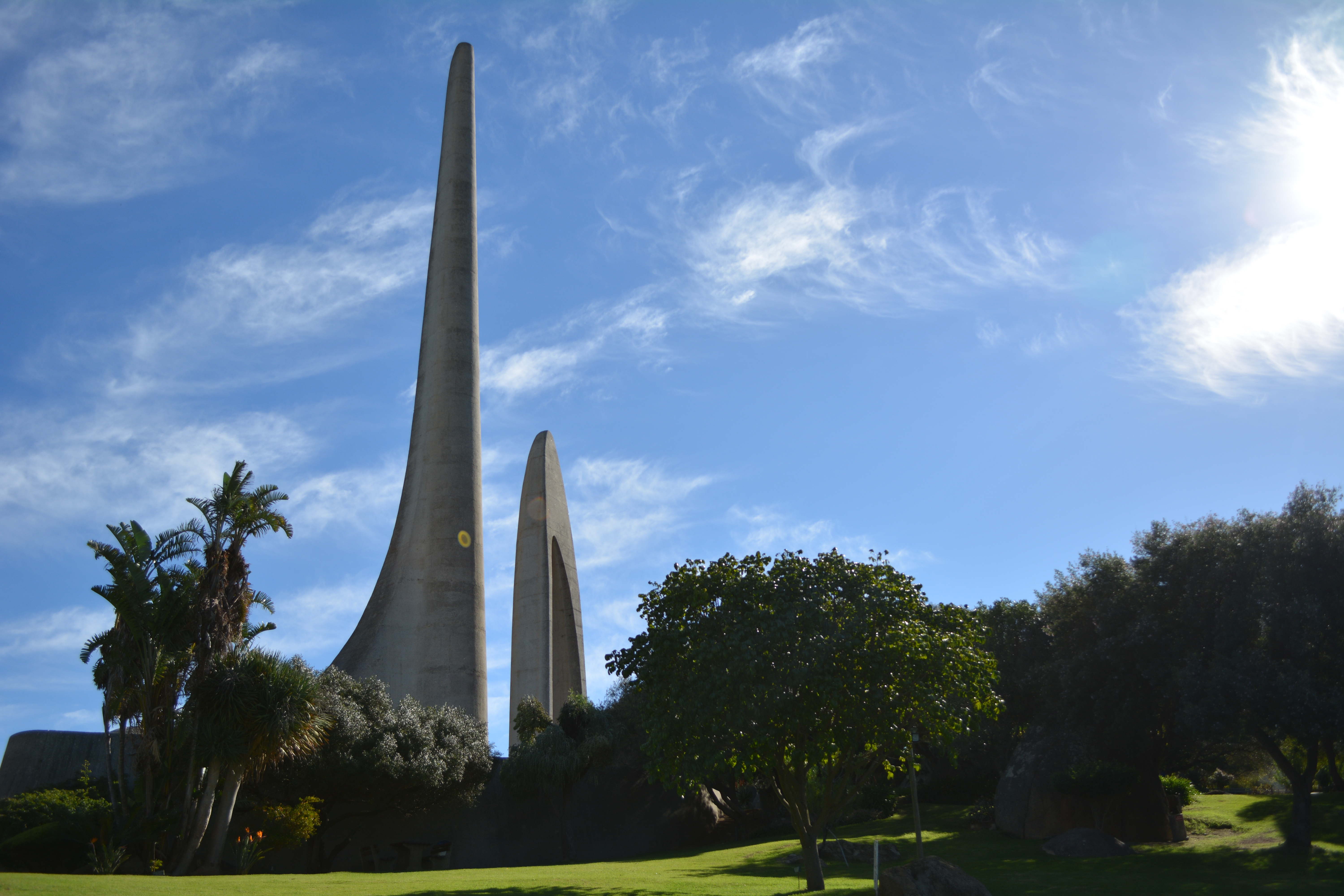 Afrikaans Taalmonument Rd., Paarl, 7646